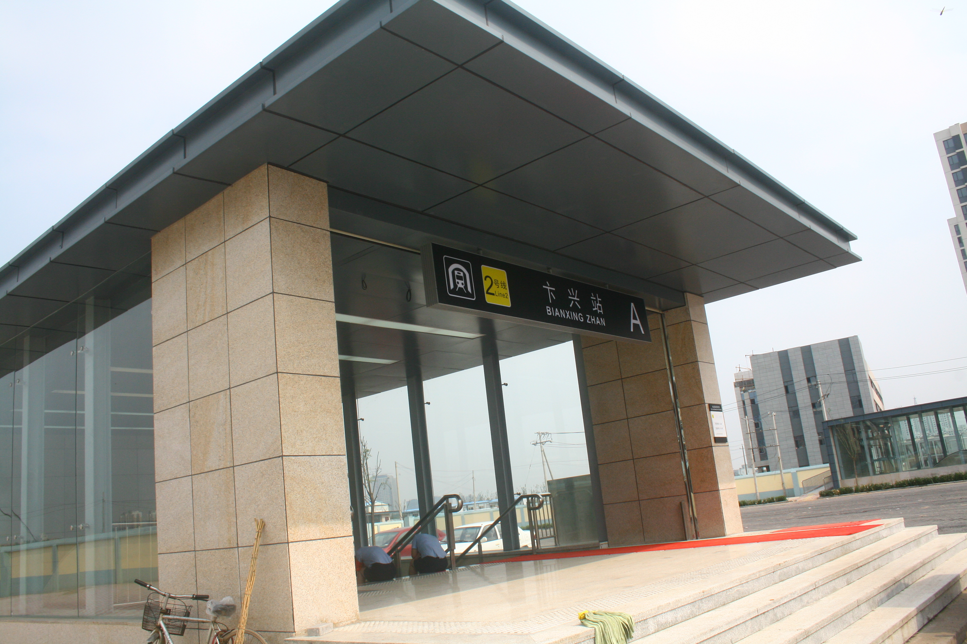 卞興站A出口